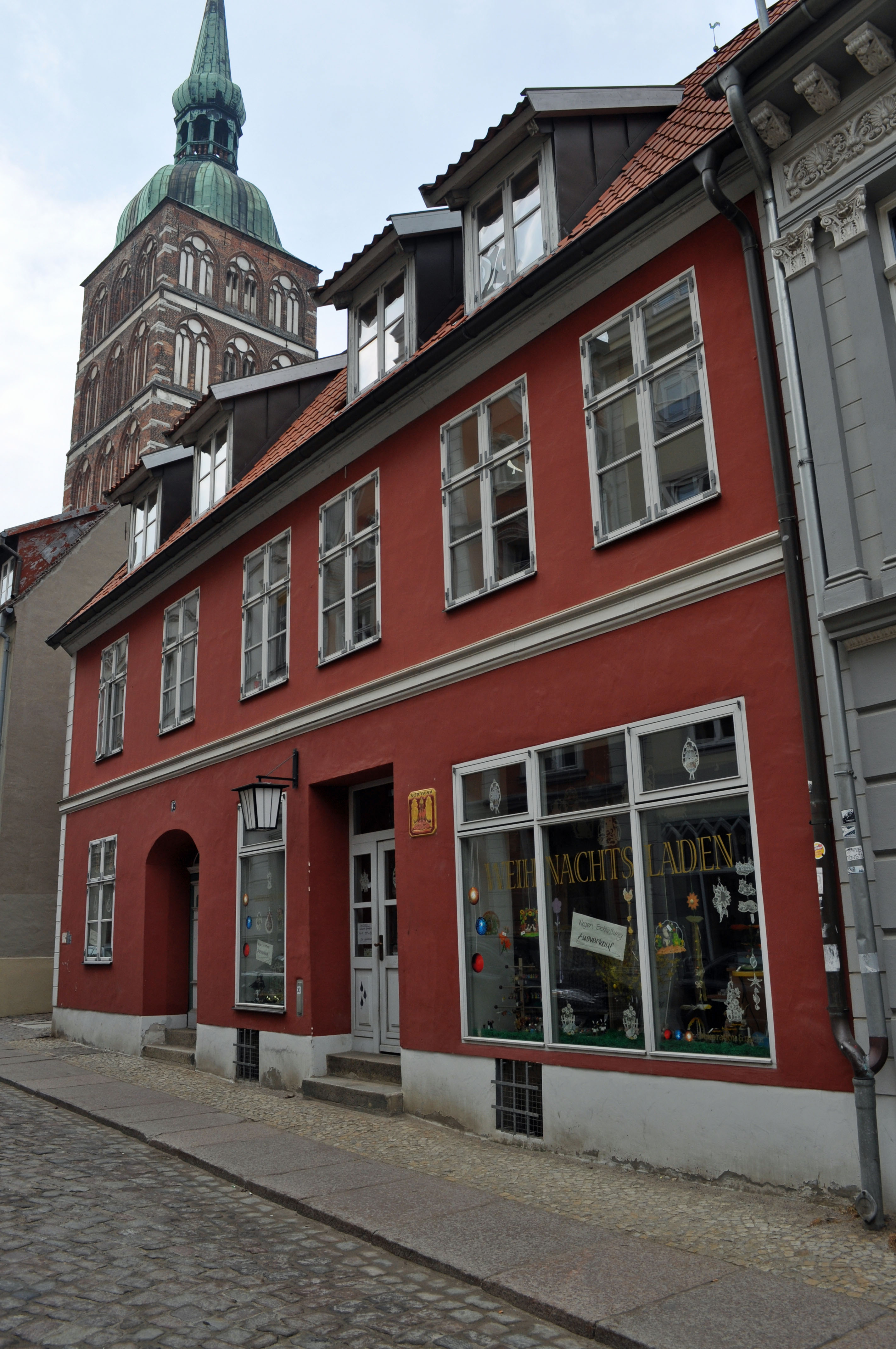 Gebäude bzw. Gebäudedetail in Stralsund. Straße und Hausnummer siehe Dateiname.